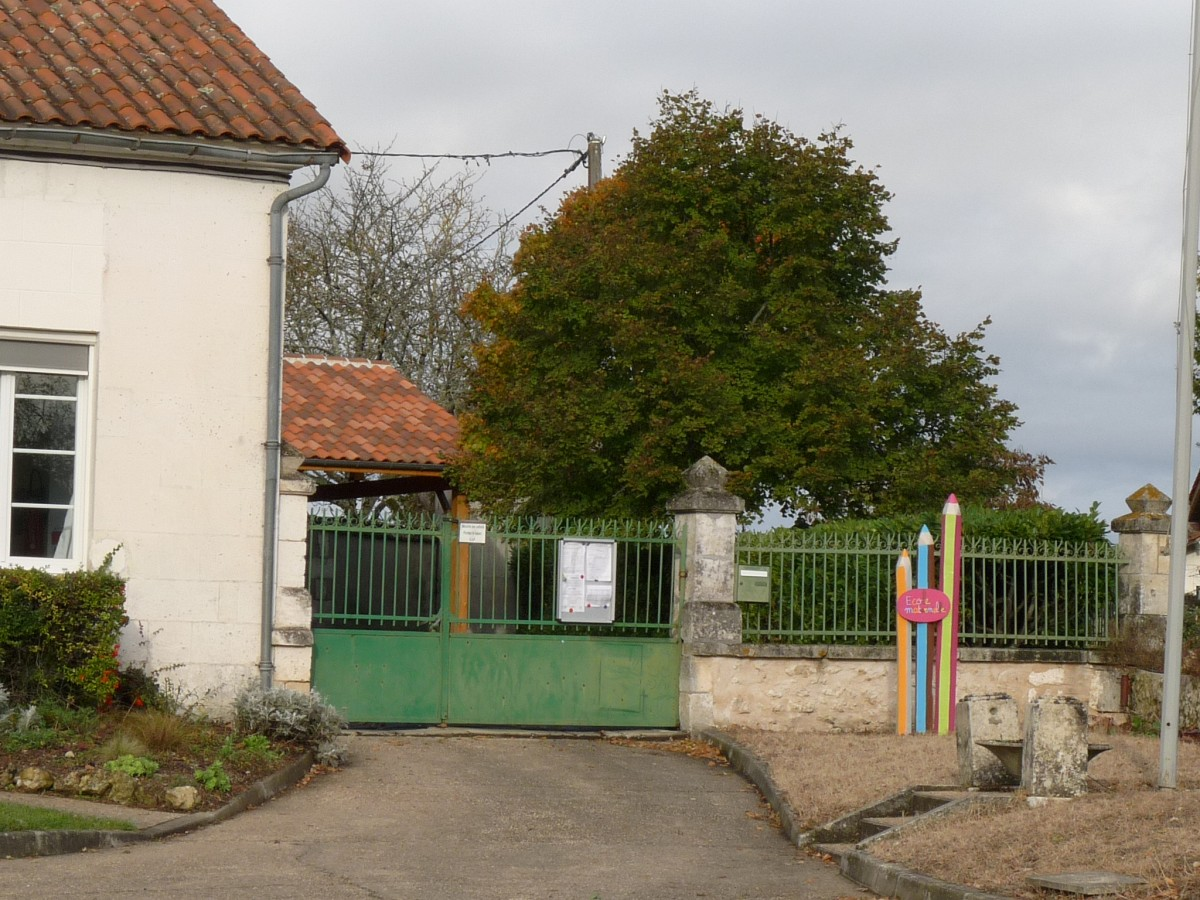 école maternelle de Salles-Lavalette (bâtiment de la mairie), Charente, France